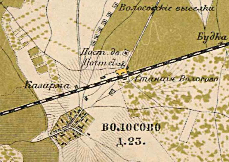 Волосово на карте 1885 года.